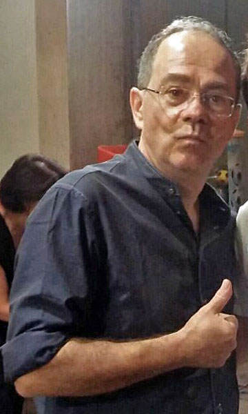 Guido Ruffa (Lupo Lucio) a Tricase nel 2016.